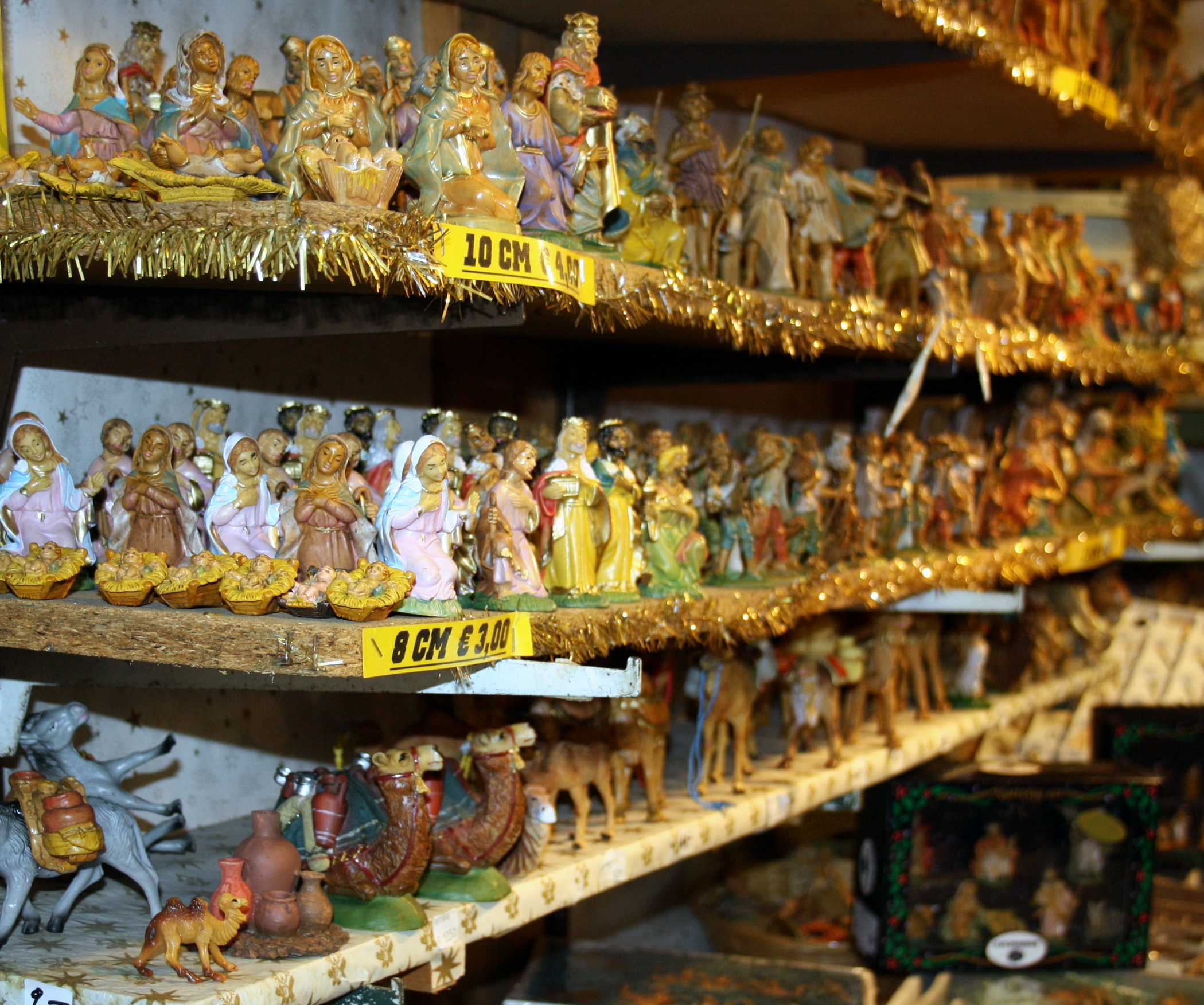 Verkauf von Krippenfiguren am Salzburger Christkindesmarkt.